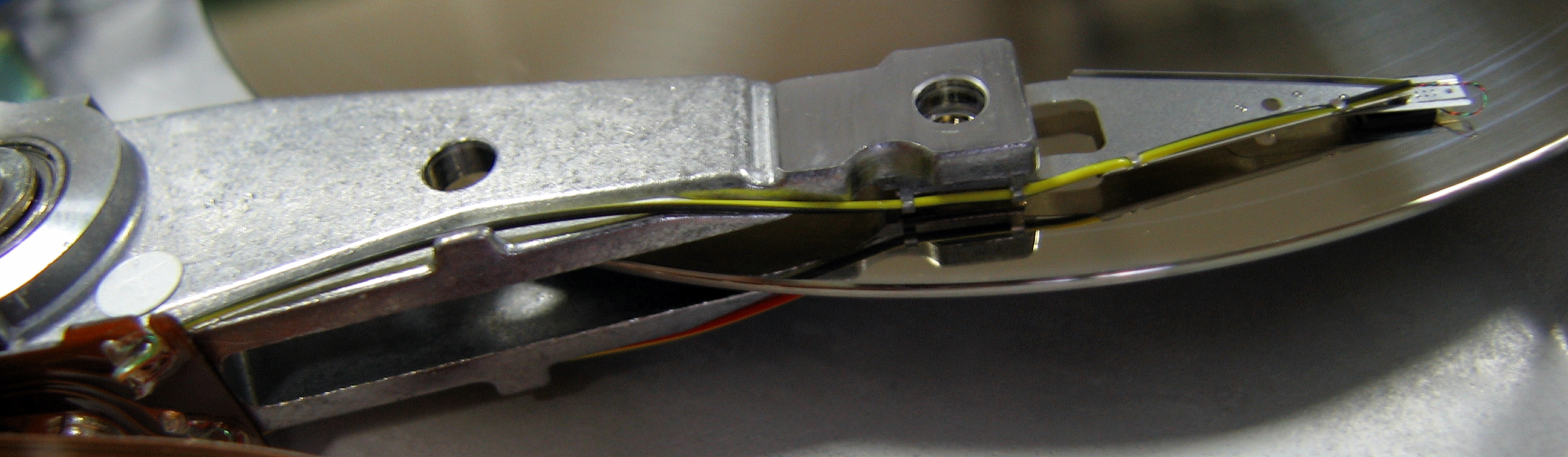 Titre : Disque dur : la tête de lecture/écriture. Licence : Auteur : Stéphane 1 avr 2005 à 00:27 (CEST)